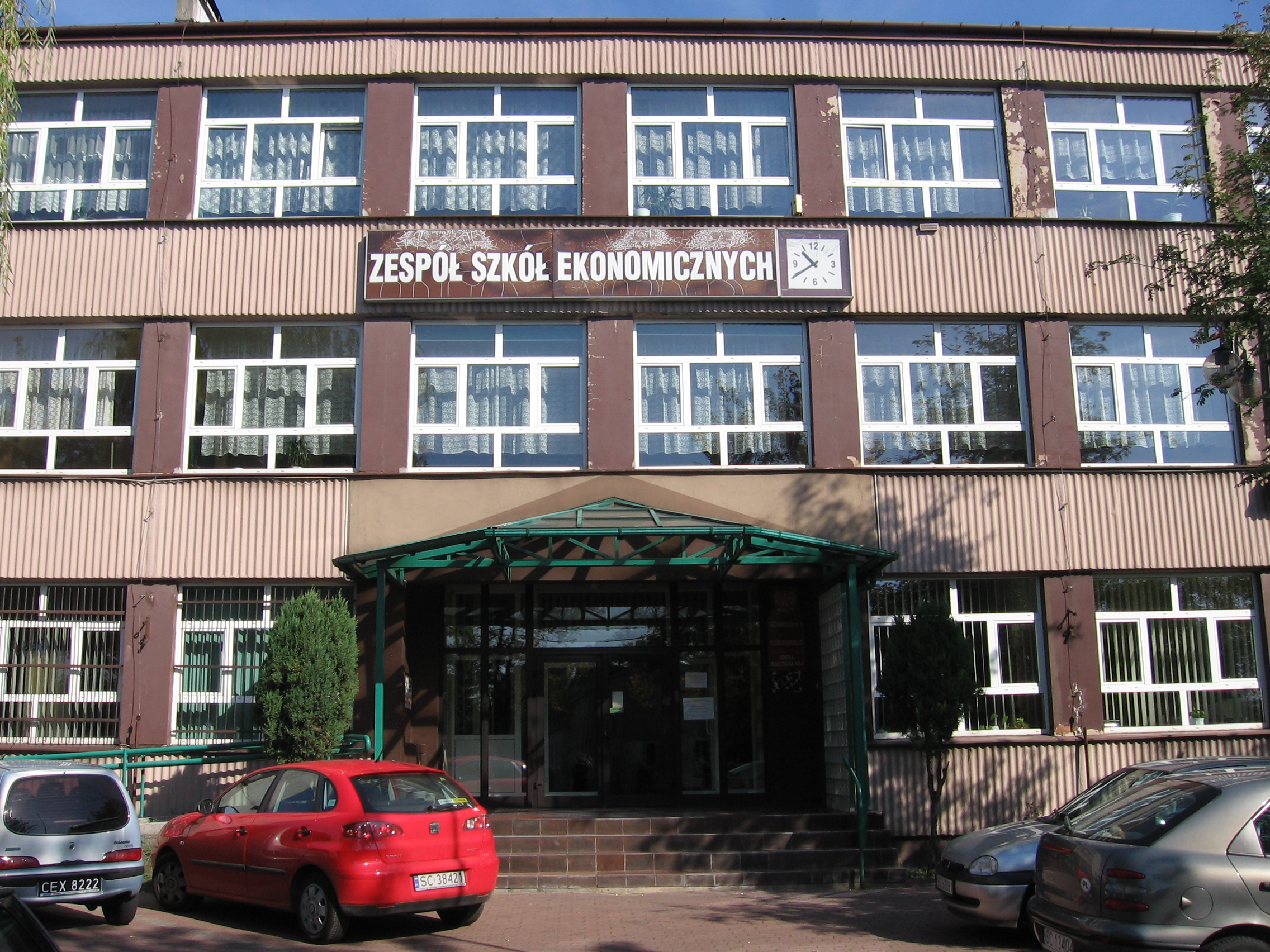 GDJ Częstochowa Poland Wikipedia Meeting 2007 - GDJ location Zespół Szkół Ekonomicznych